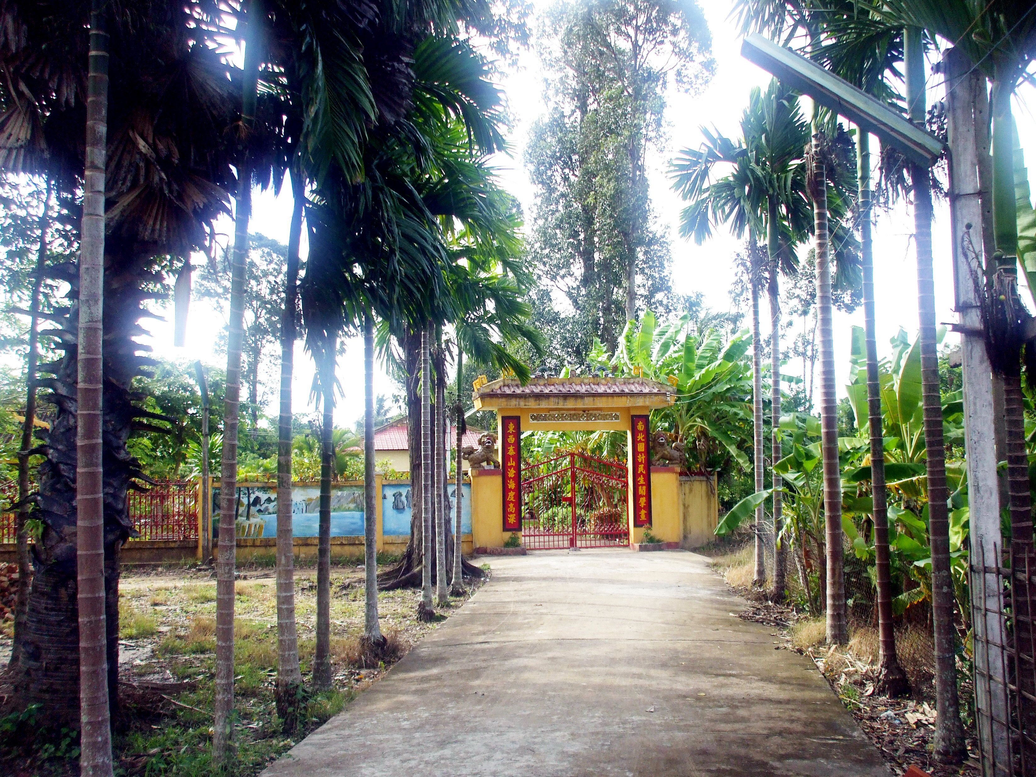 Đường nhỏ dẫn vào khu lăng Thống chế Điều bát Nguyễn Văn Tồn (1763–1820) ở ấp Mỹ Hòa, xã Thiện Mỹ, huyện Trà Ôn, tỉnh Vĩnh Long, Việt Nam.